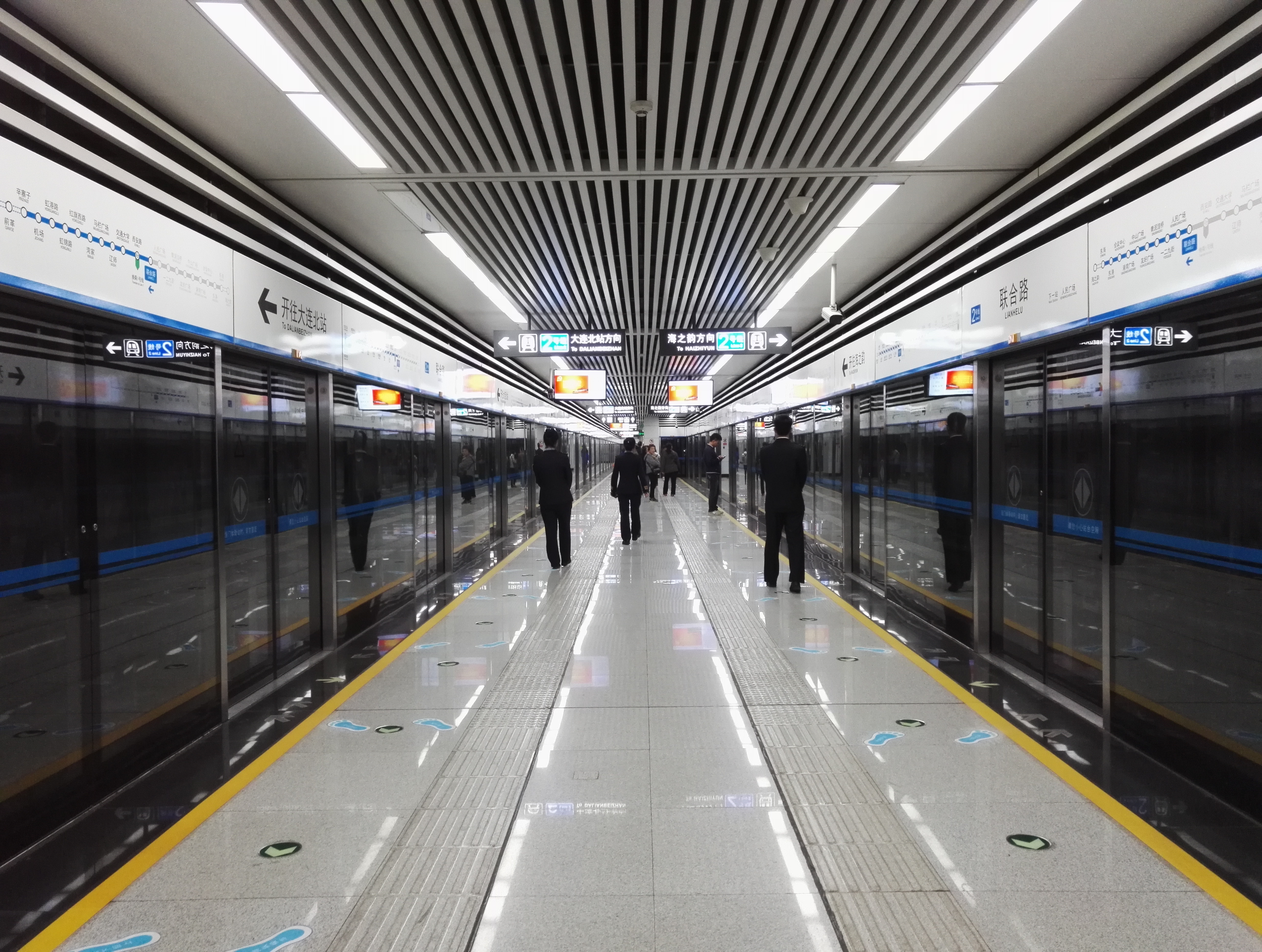 大连地铁2号线联合路站站台。